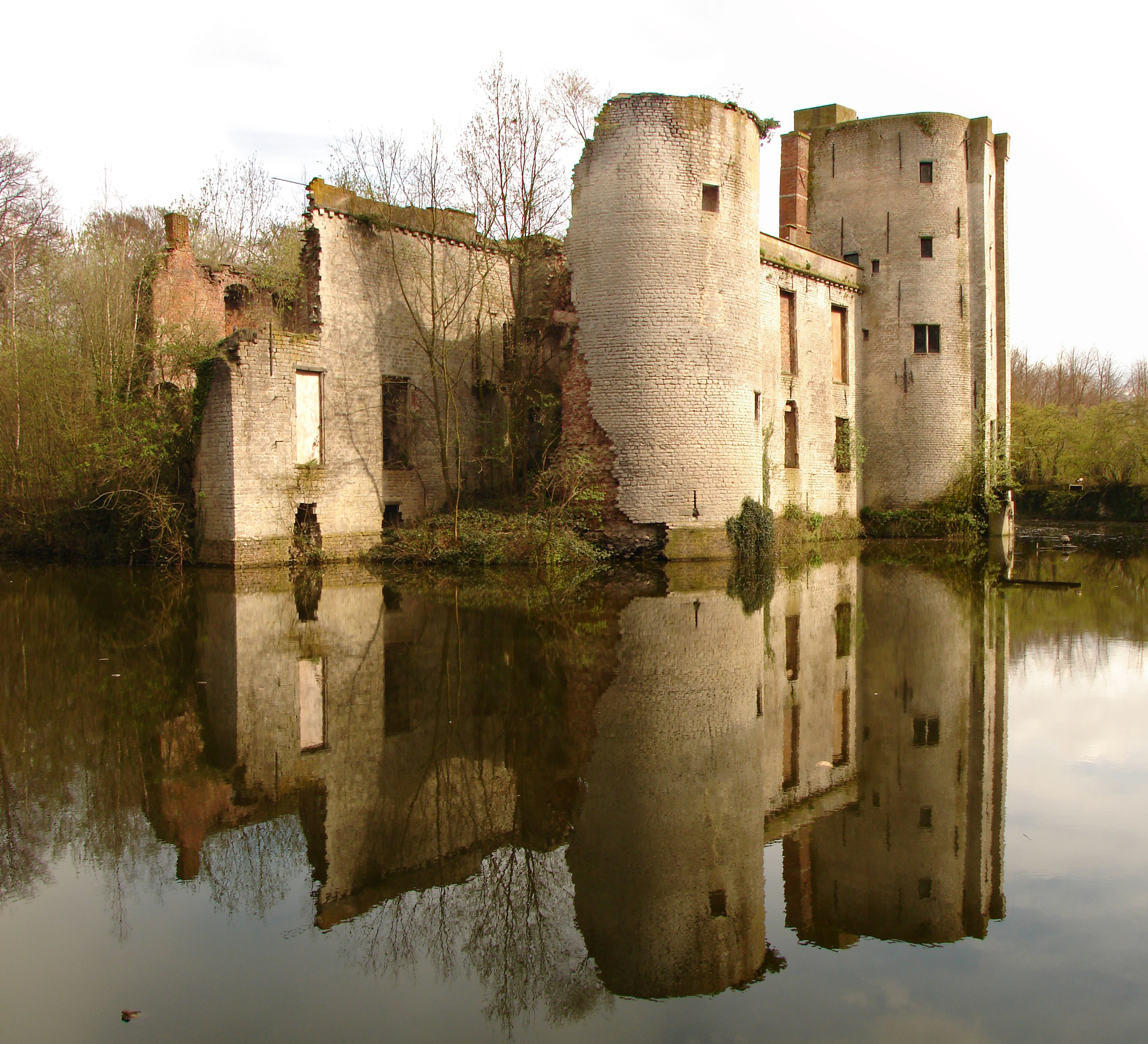 Het Prinsenkasteel te Grimbergen